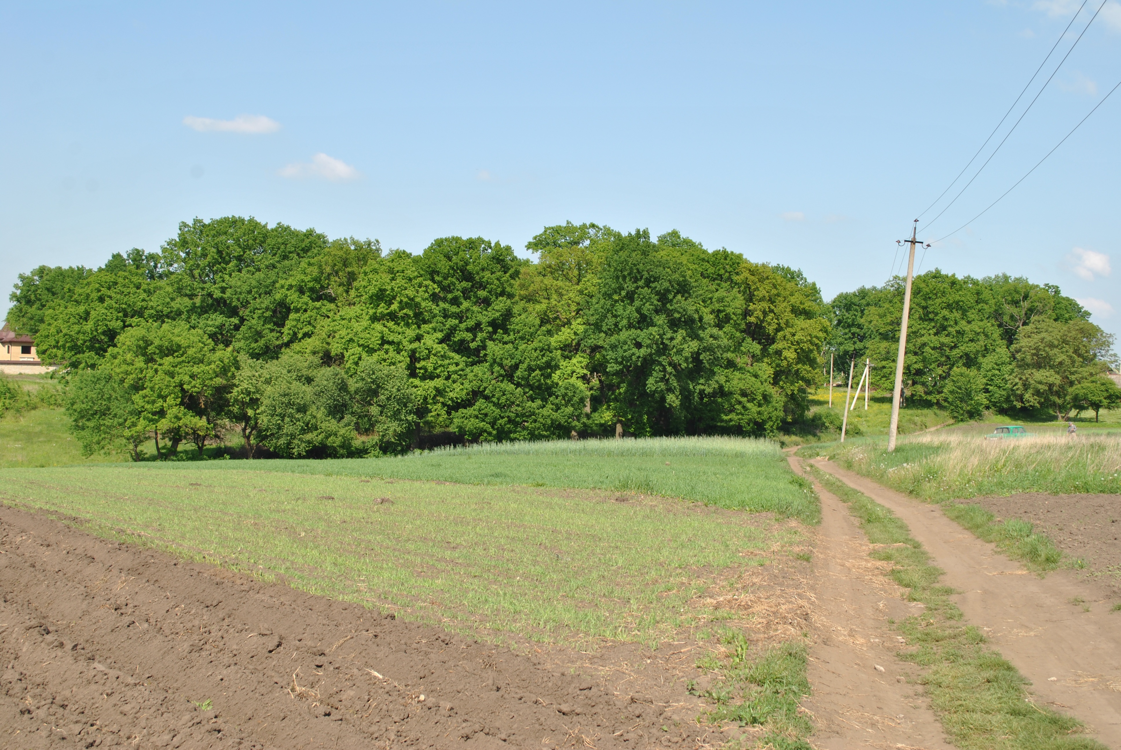 Ландшафтний заказник місцевого значення «Наші гаї» — лісові масиви в межах населеного пункту с. Великі Гаї Тернопільського району Тернопільської області.